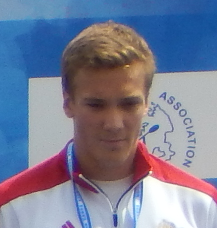 Церемония награждения соревнований в байдарке-одиночке у женщин на 1000 м